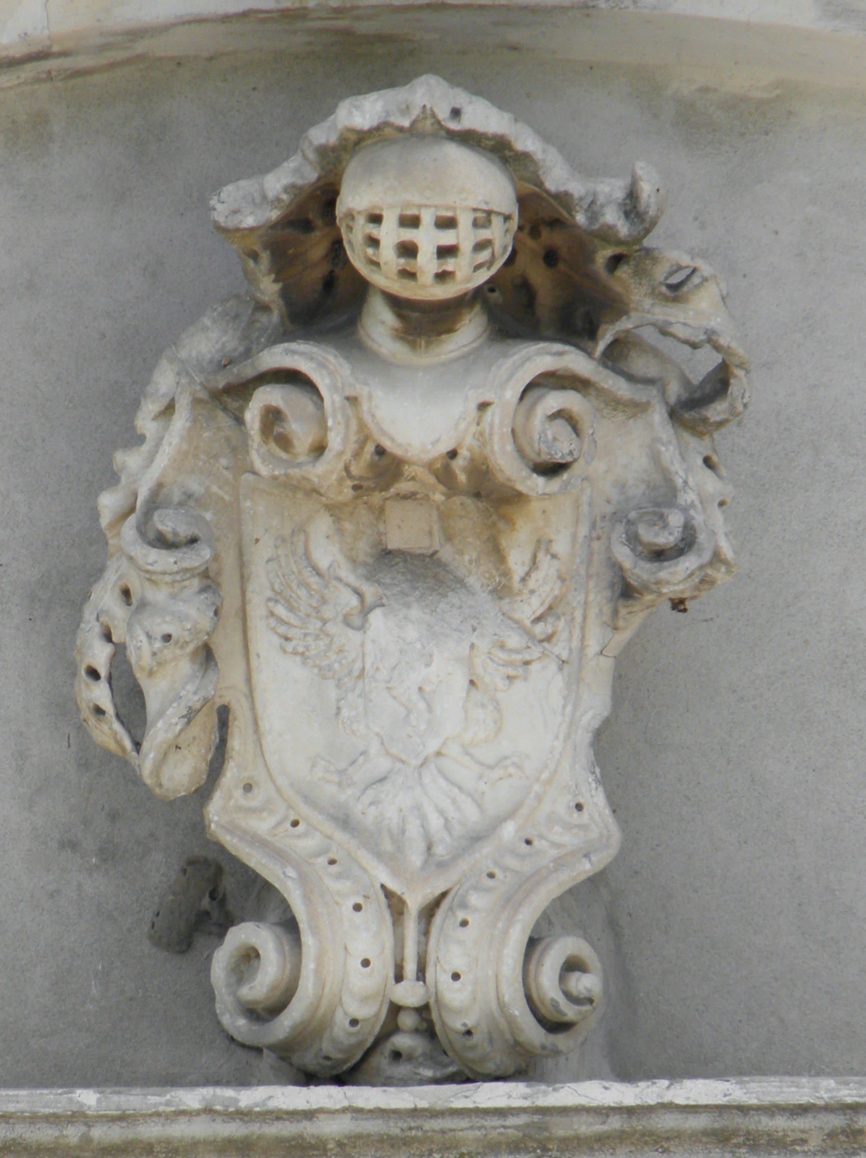 Baricetta, frazione del comune di Adria: stemma familiare presente nel timpano dell'oratorio della Natività di Maria nel complesso di Villa Grassi.